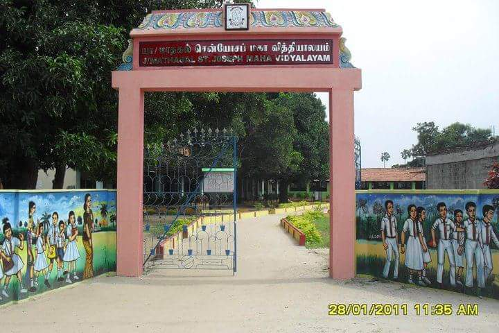 சென் யோசப் பாடசாலையின் முகத்தோற்றம்